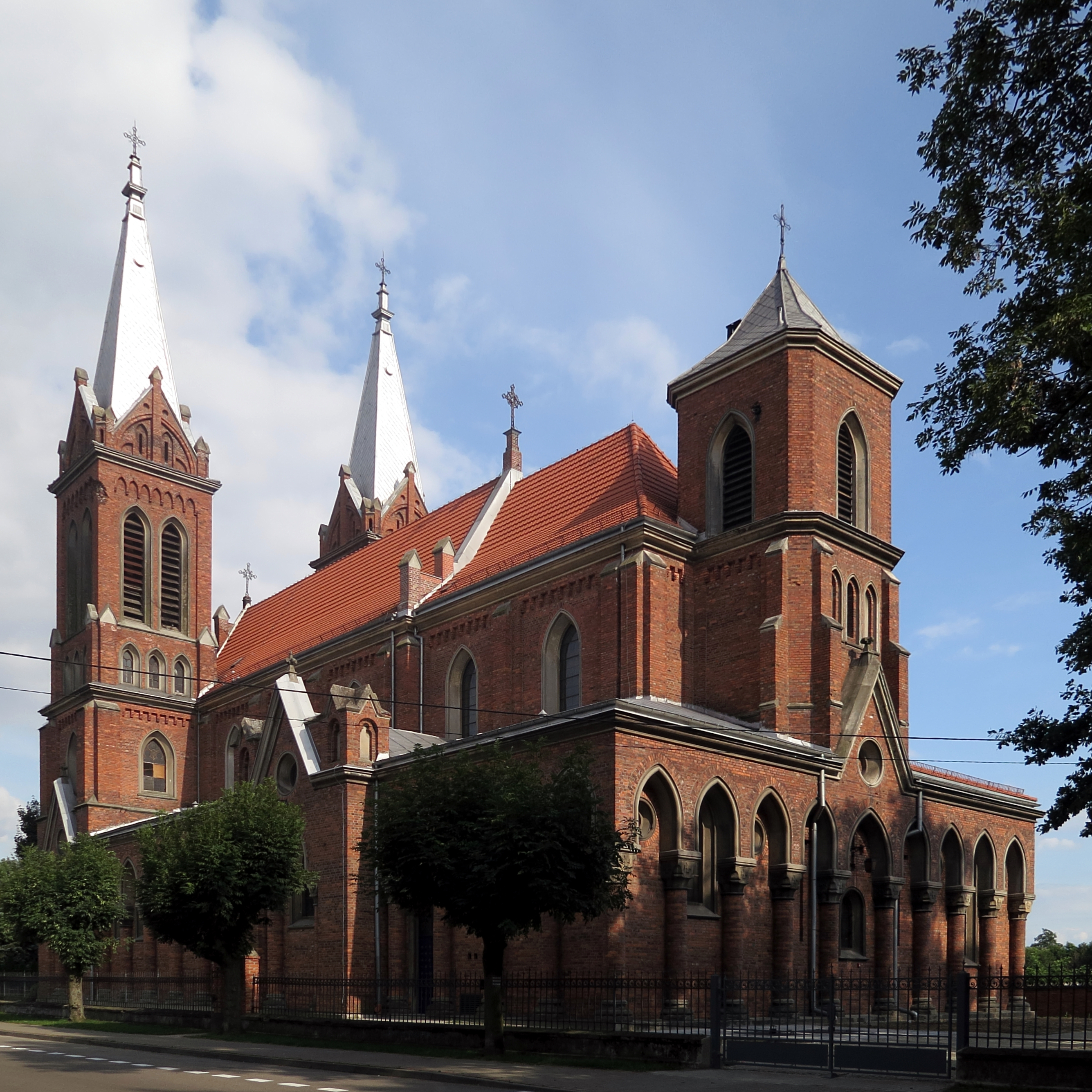 Opatówek, kościół par. p.w. Najśw. Serca Pana Jezusa i św. Doroty, 1905-1912